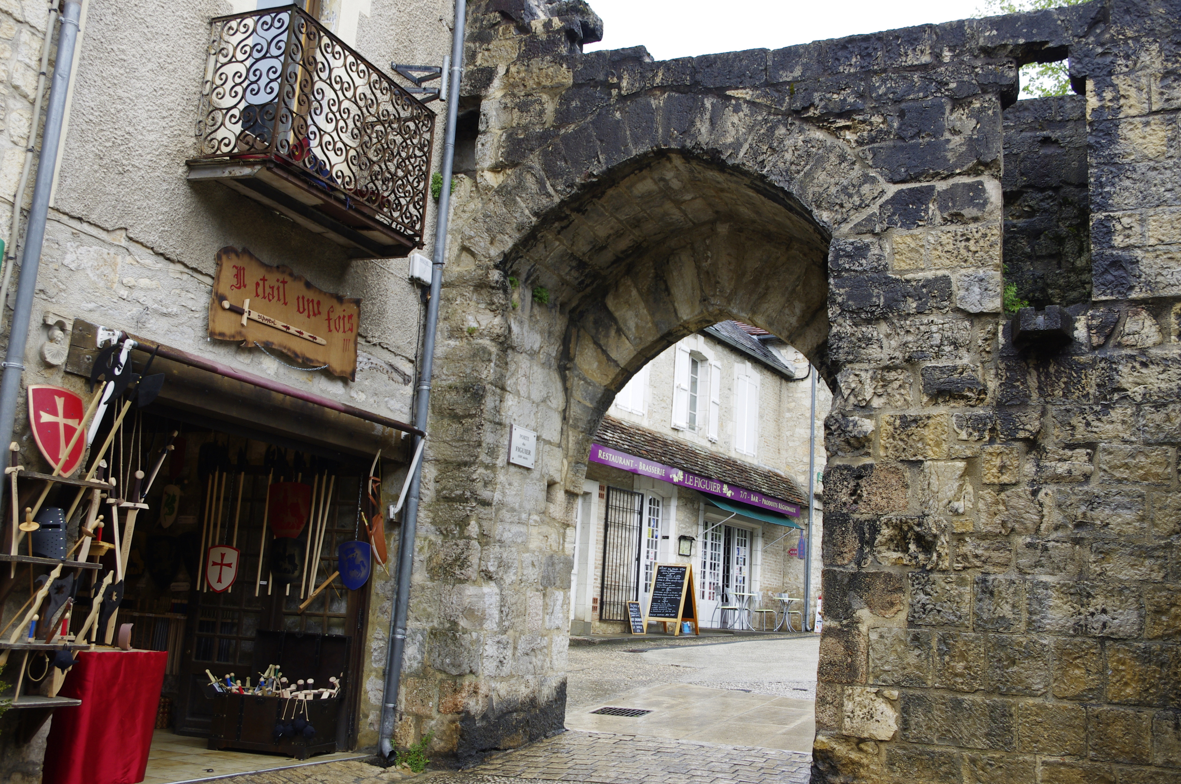 Rocamadour, Lot, France - porte du Figuier.